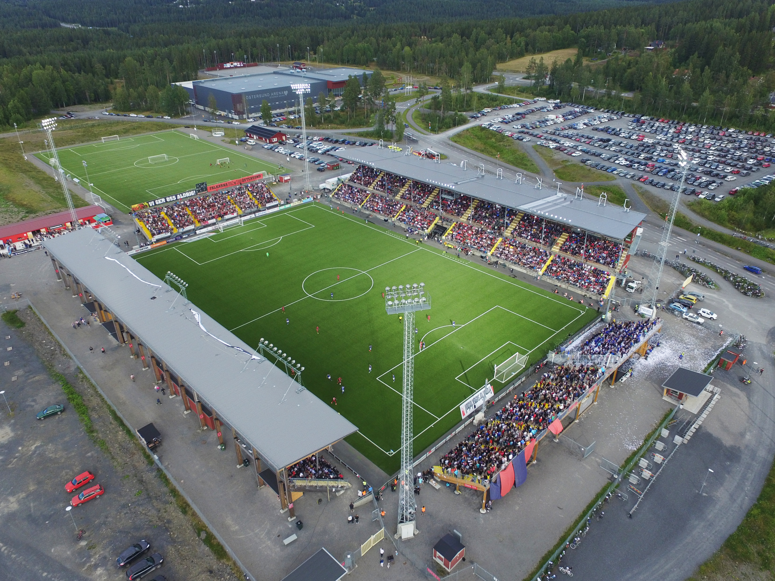 Jämtkraft Arena under matchen mellan ÖFK och GIF Sundsvall 2016-08-06